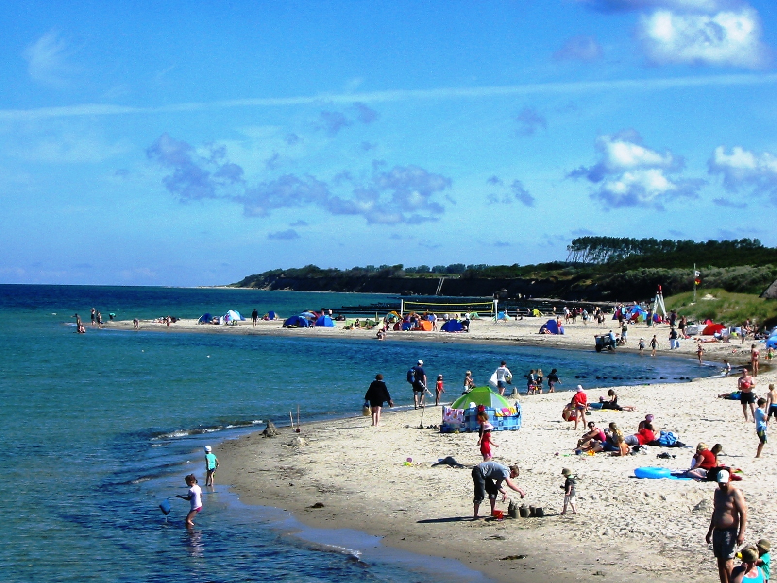 Blick von der Seebrücke auf den Strand von Wustrow (Fischland). Im Hintergrund ist die Steilküste von Ahrenshoop zu sehen.